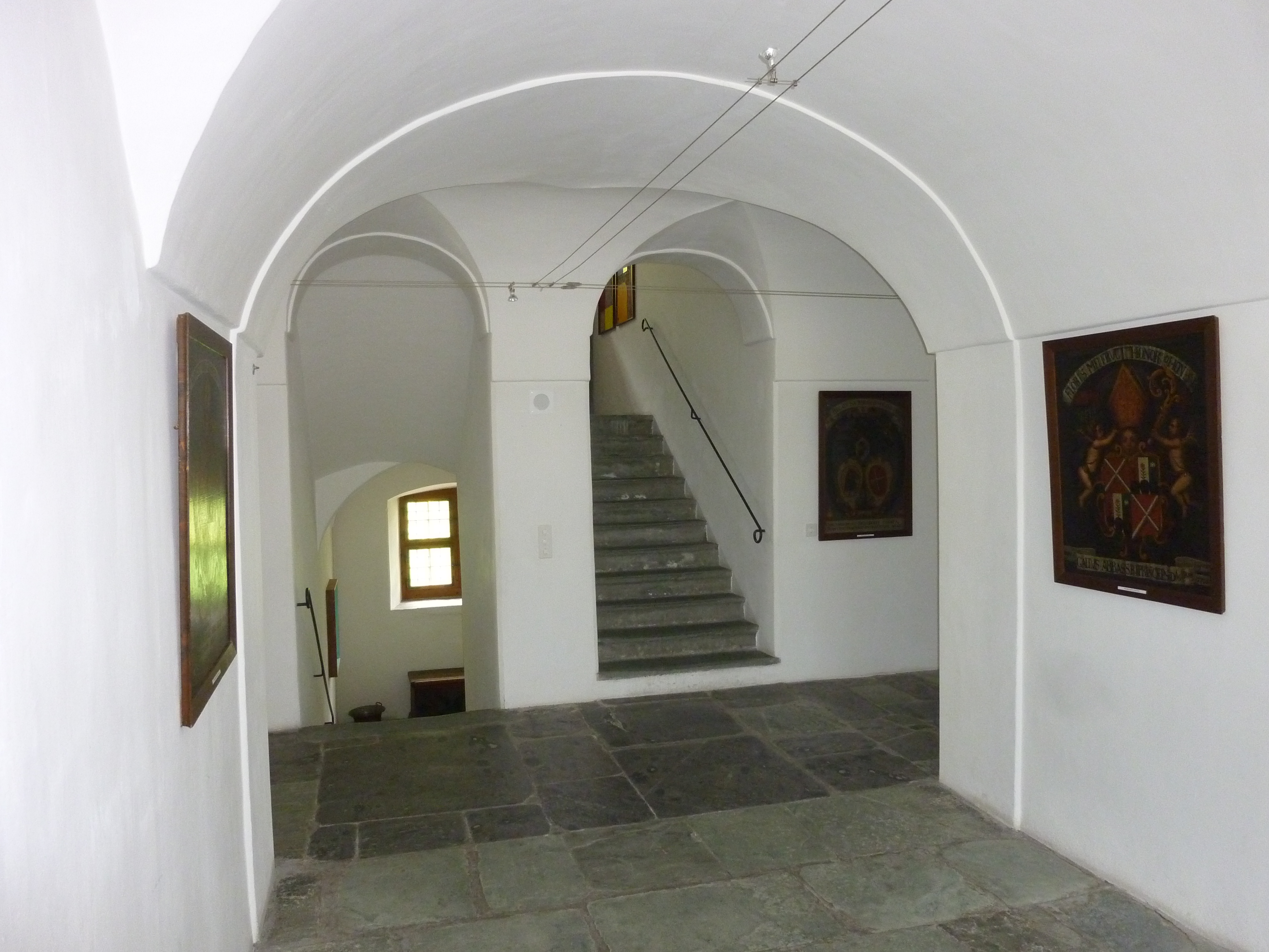 Cuort Ligia Grischa Treppenhaus